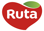 Логотип TM Ruta